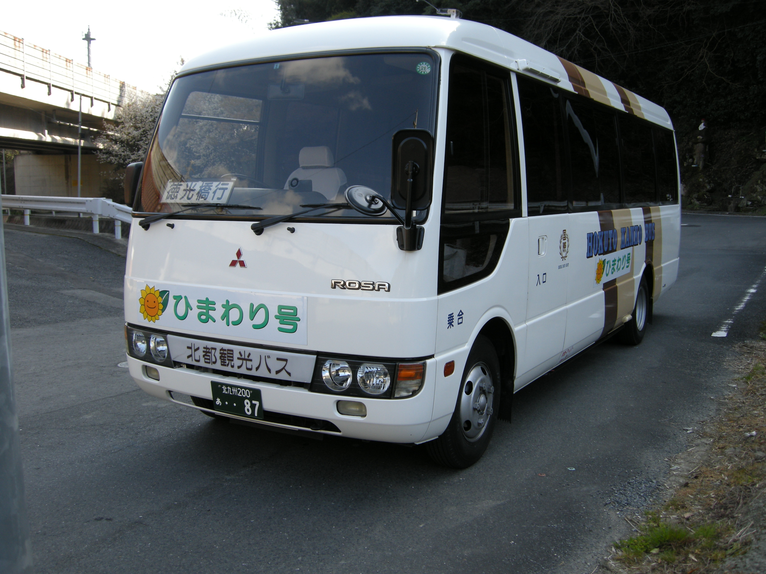 北都観光バス 北九州市おでかけ交通「ひまわり号」の車両